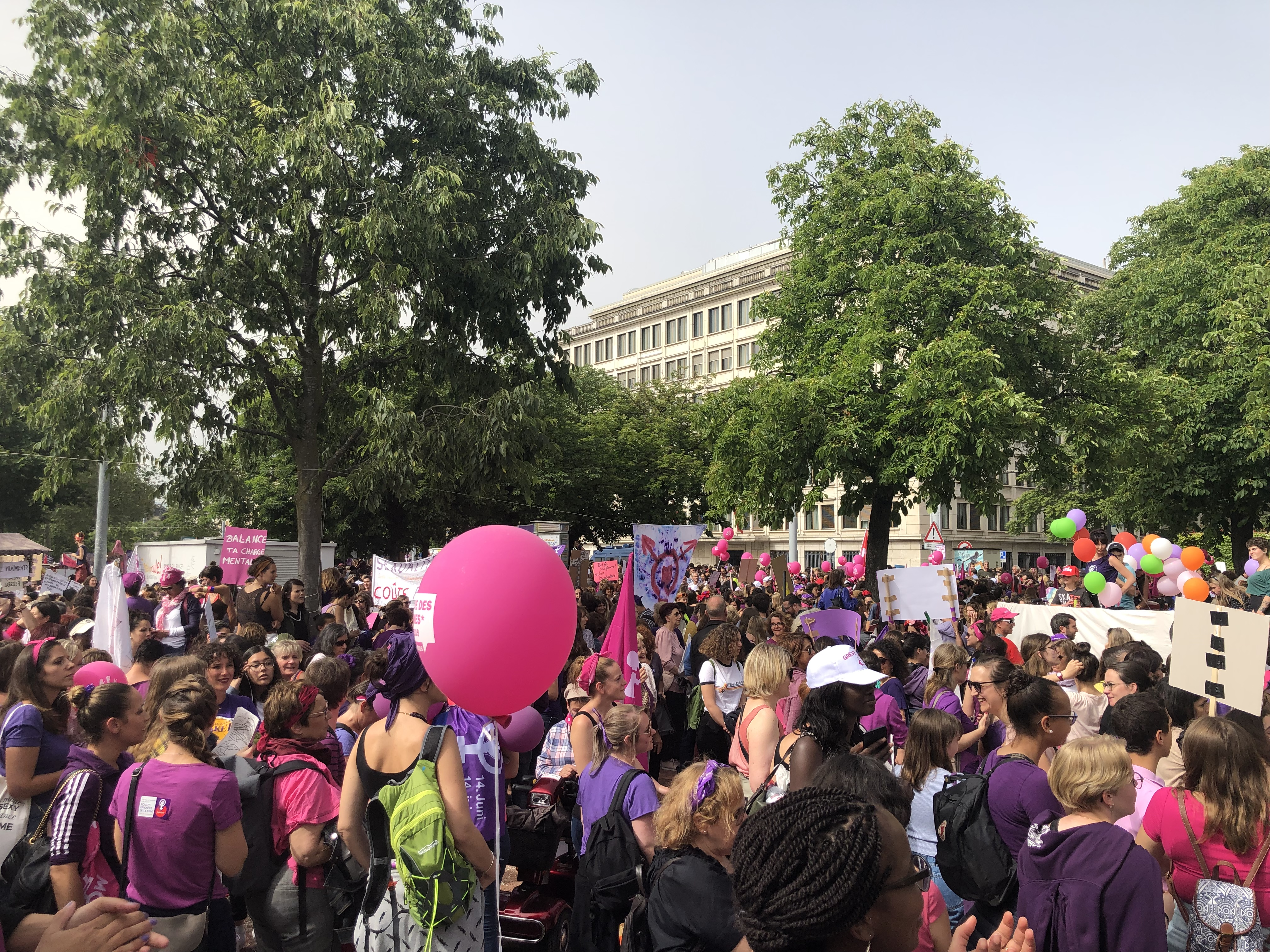 lGrèvevdes femmes à l’Unige 14 juin 2019, grève des femmes du 14 juin 2019 à Genève